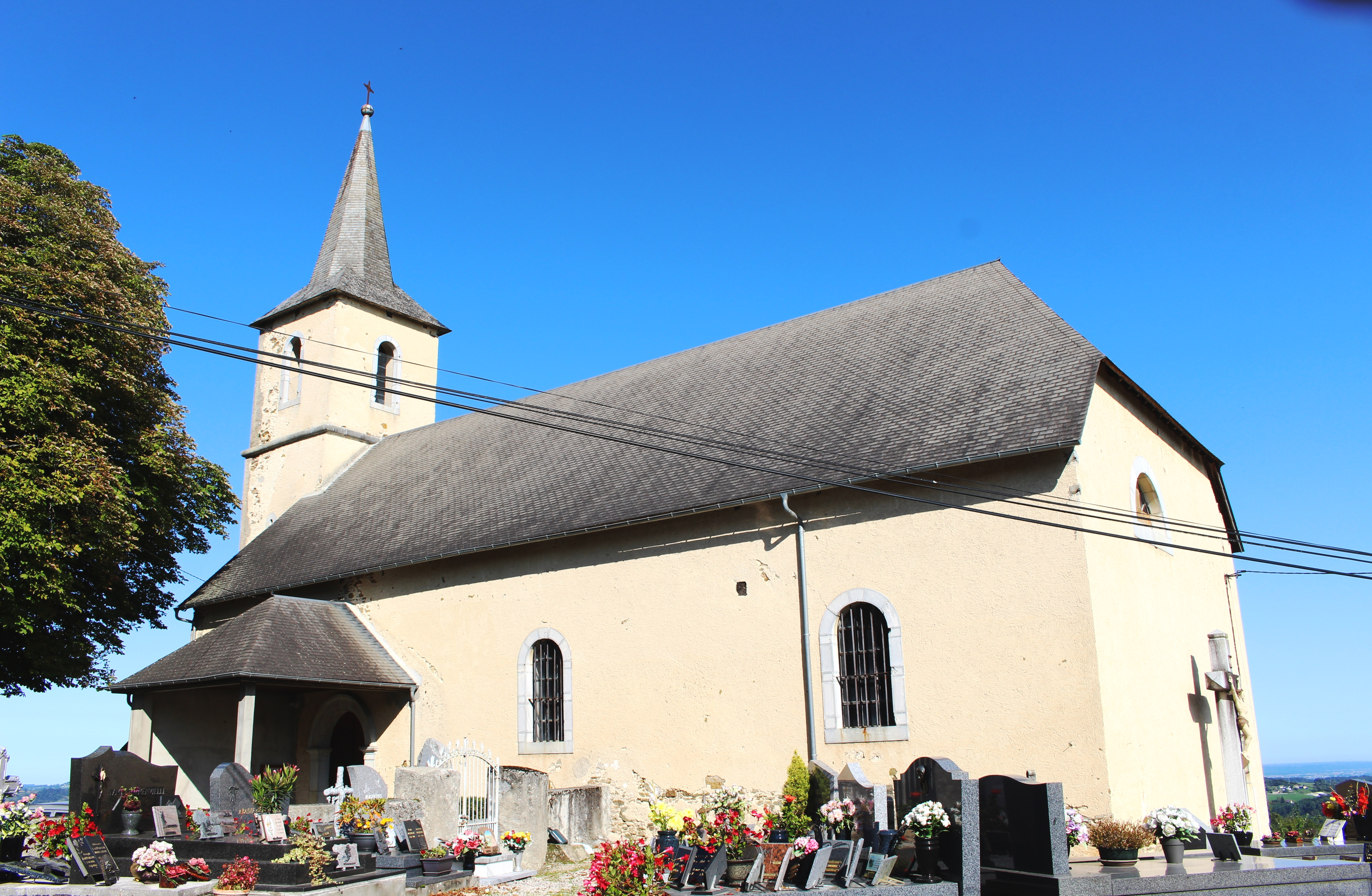 Église Saint-André d'Astugue (Hautes-Pyrénées)